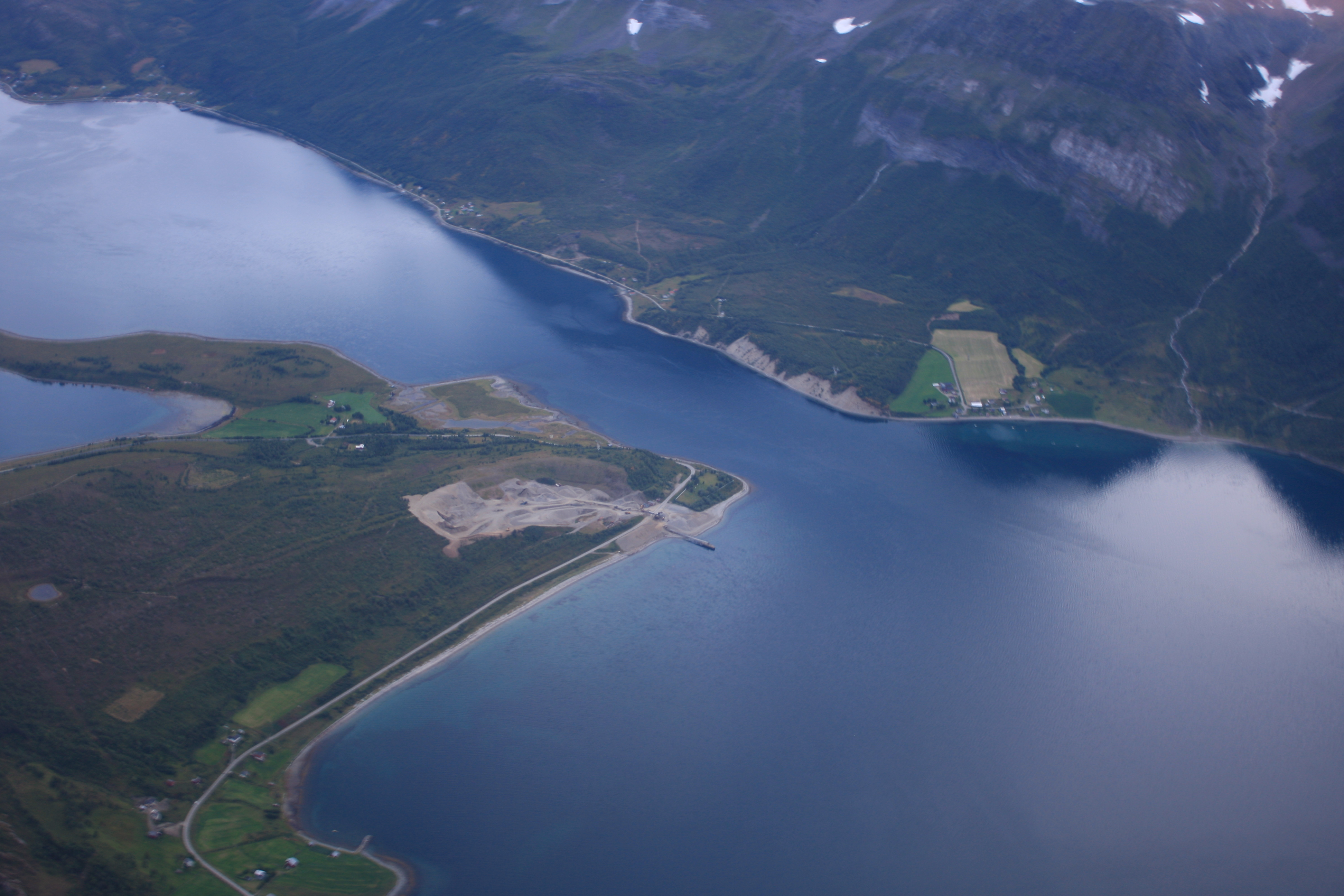 Nice deterent bot/scripting dgh667544